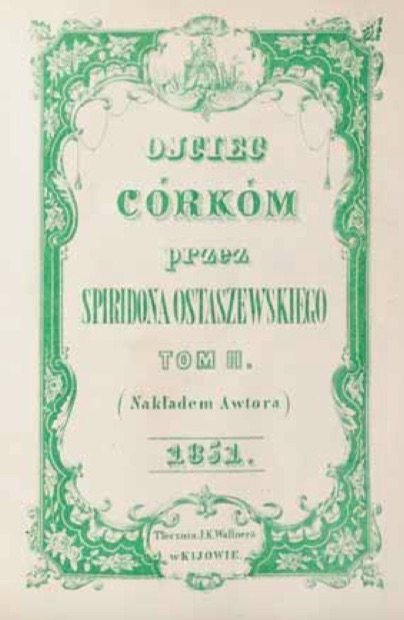 OSTASZEWSKI Spiridon – Ojciec córkom. T. 1-2. Kijów 1851-1852